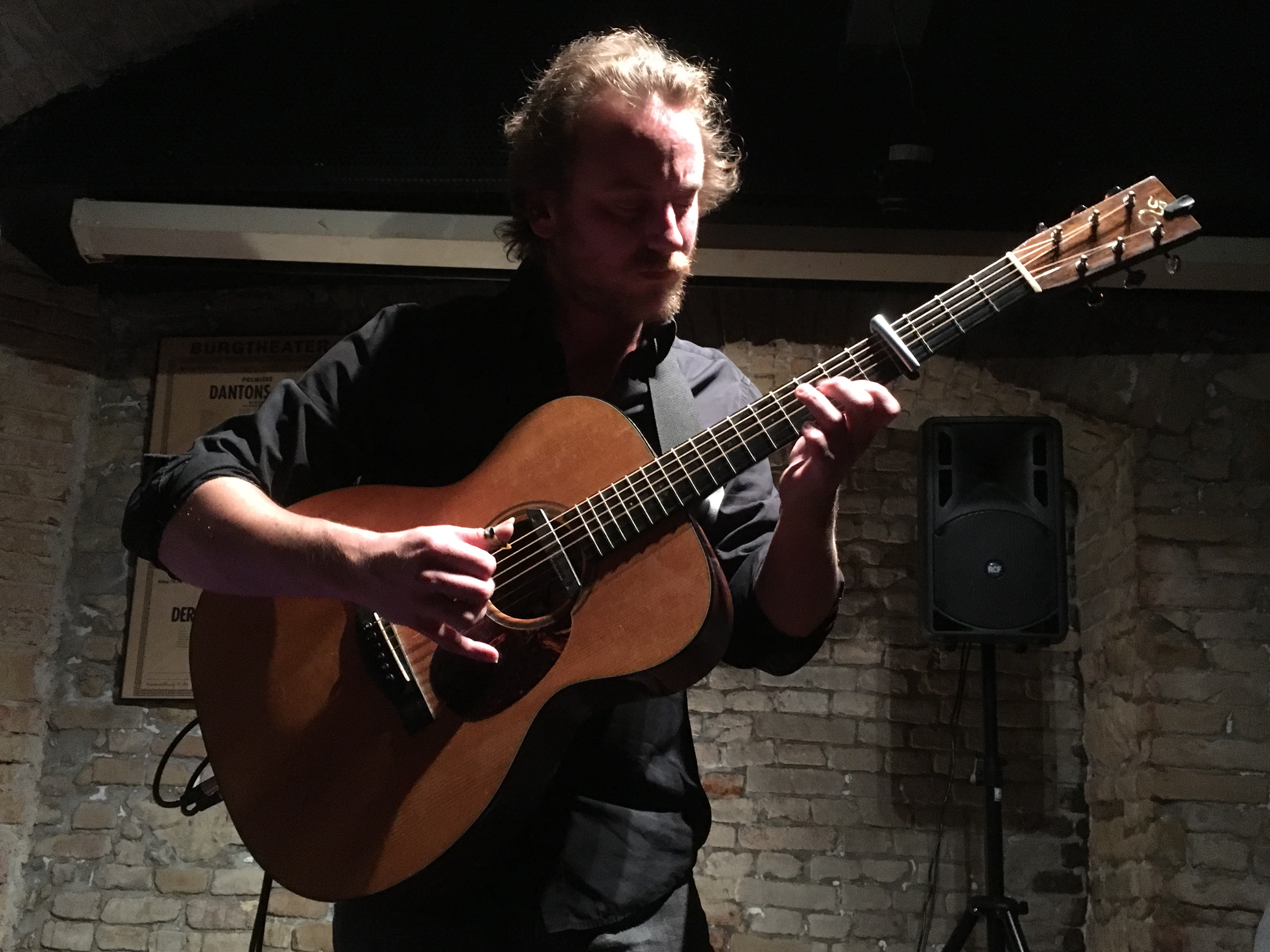 Markus Schlesinger Wien bei seinem Wien-Konzert in der "Fromme Helene" 2018